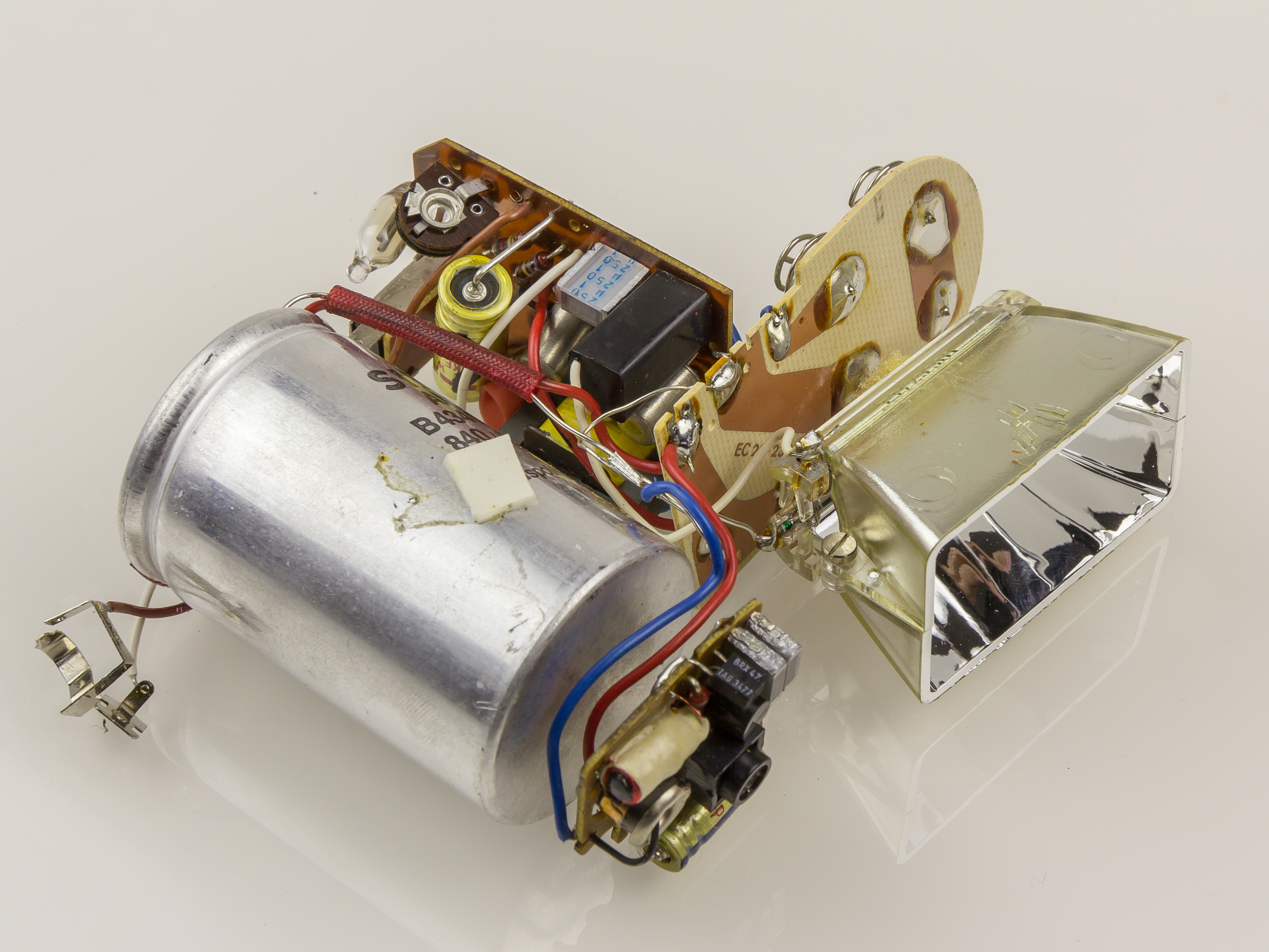 Photographic flash Revue tron bc 28